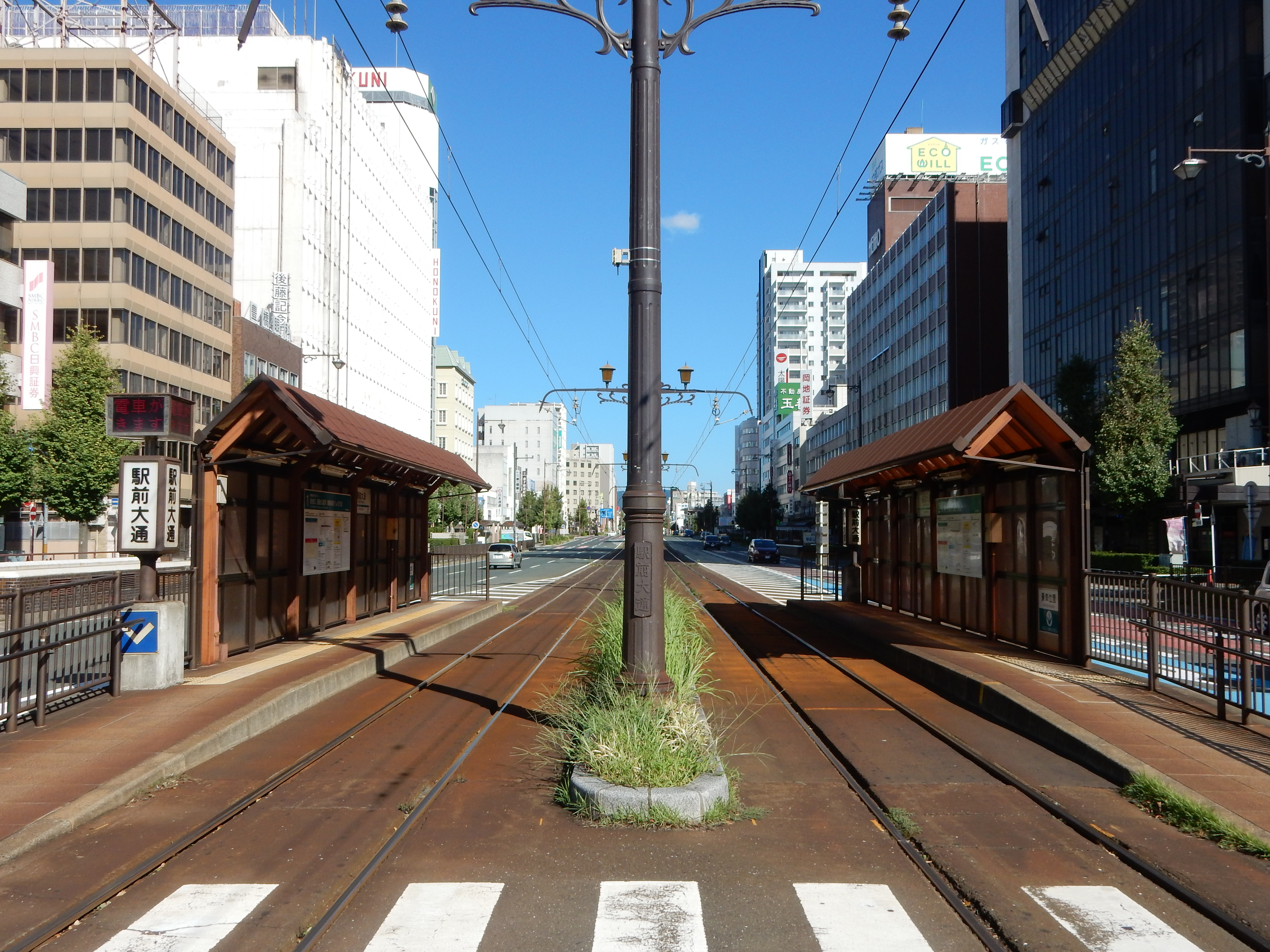 駅前大通停留場。愛知県豊橋市駅前大通